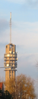 Alphen aan den Rijn, Straalverbindingstoren (zelf gemaakte foto)